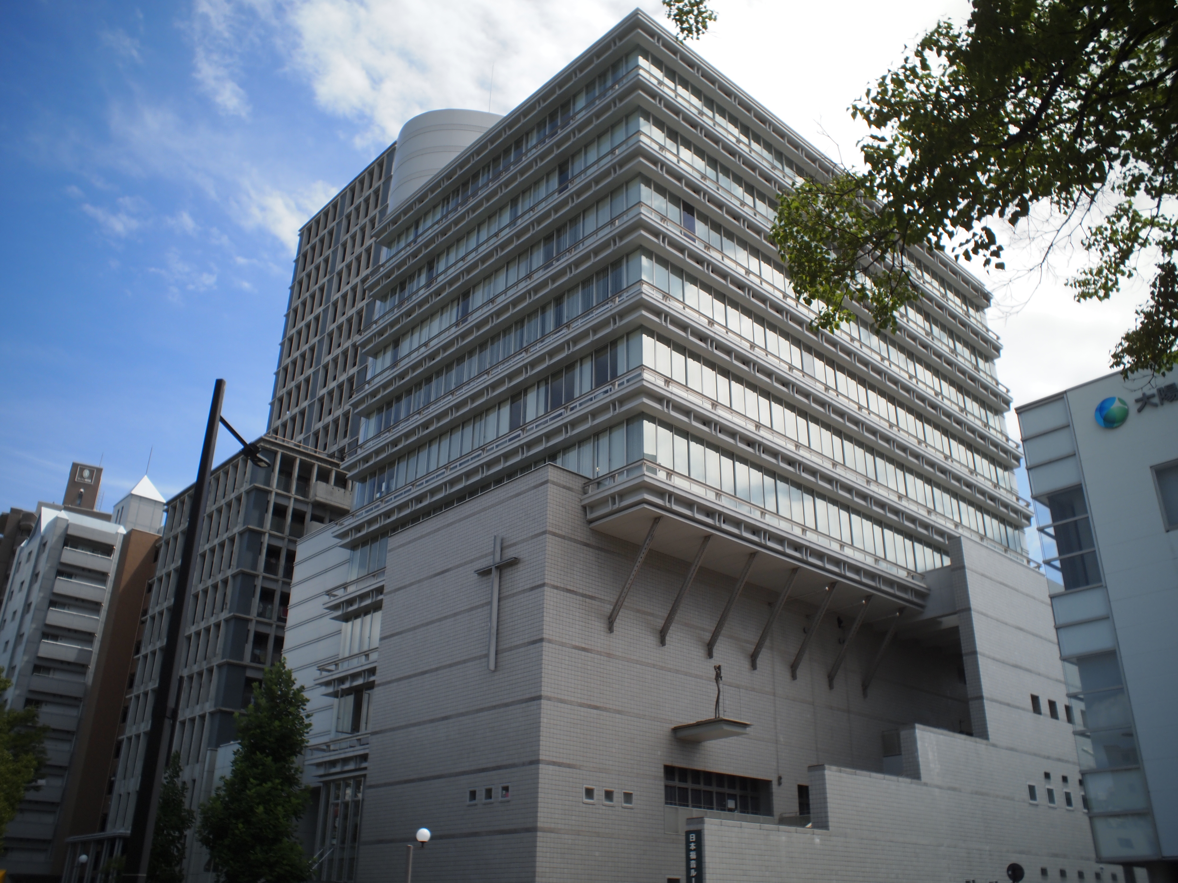 ルーデル広島大通り